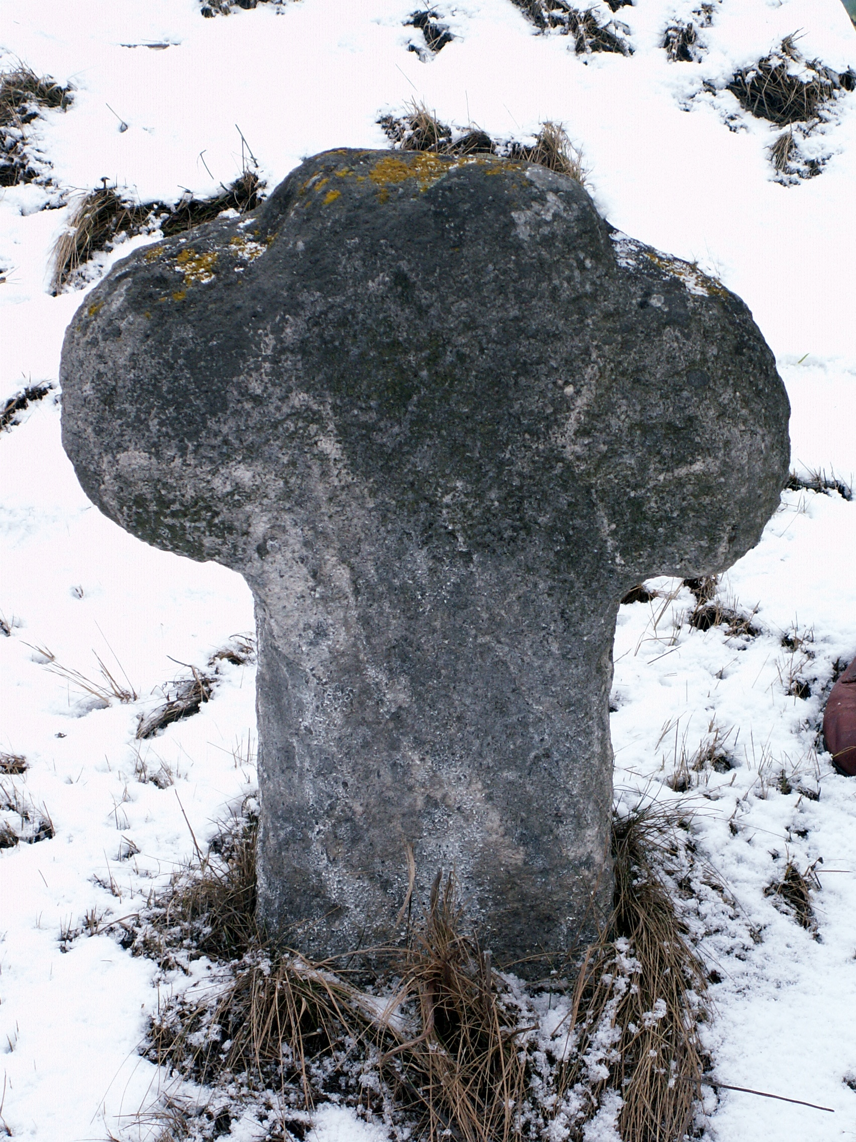 Krzyż kamienny w Gołaszynie